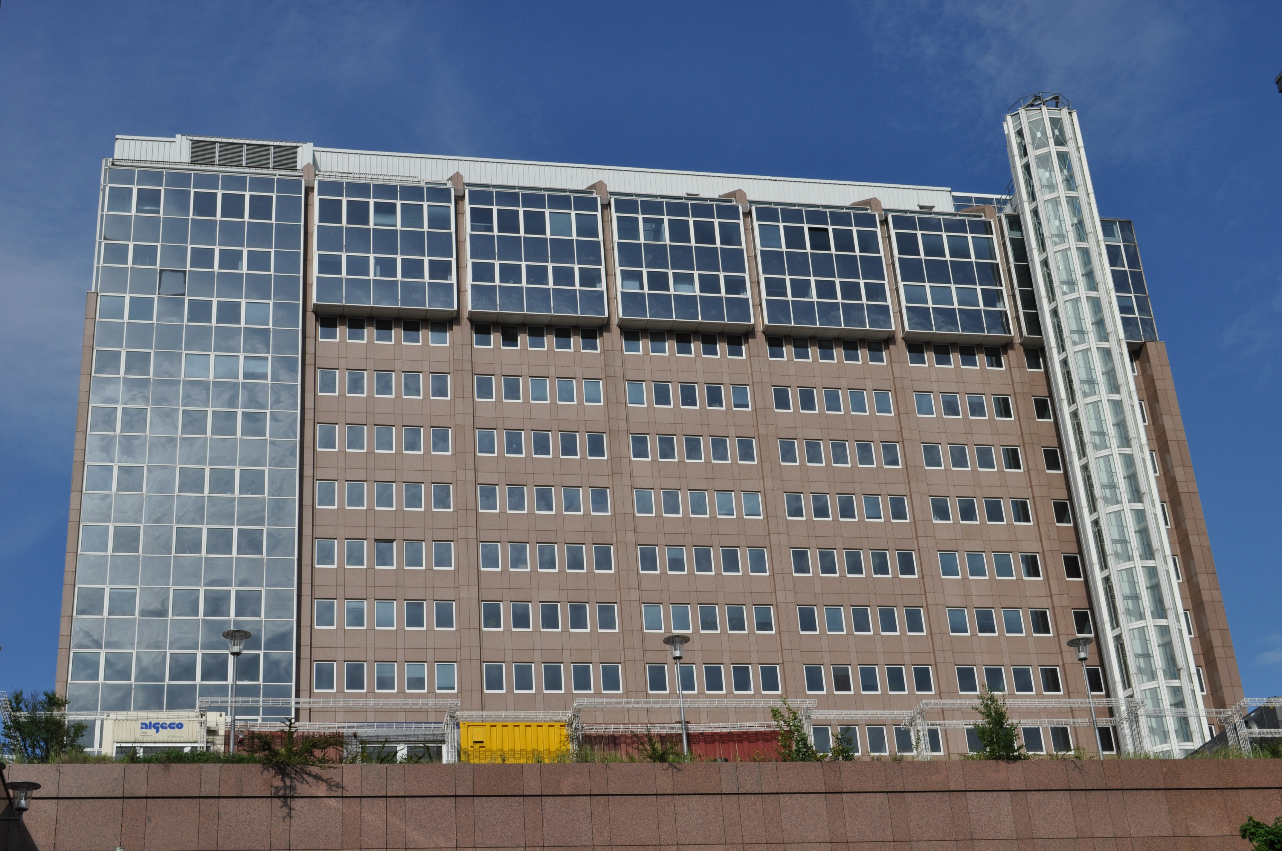 Blick von Westen auf das Bürogebäude Neues Steintor in Hamburg-St. Georg